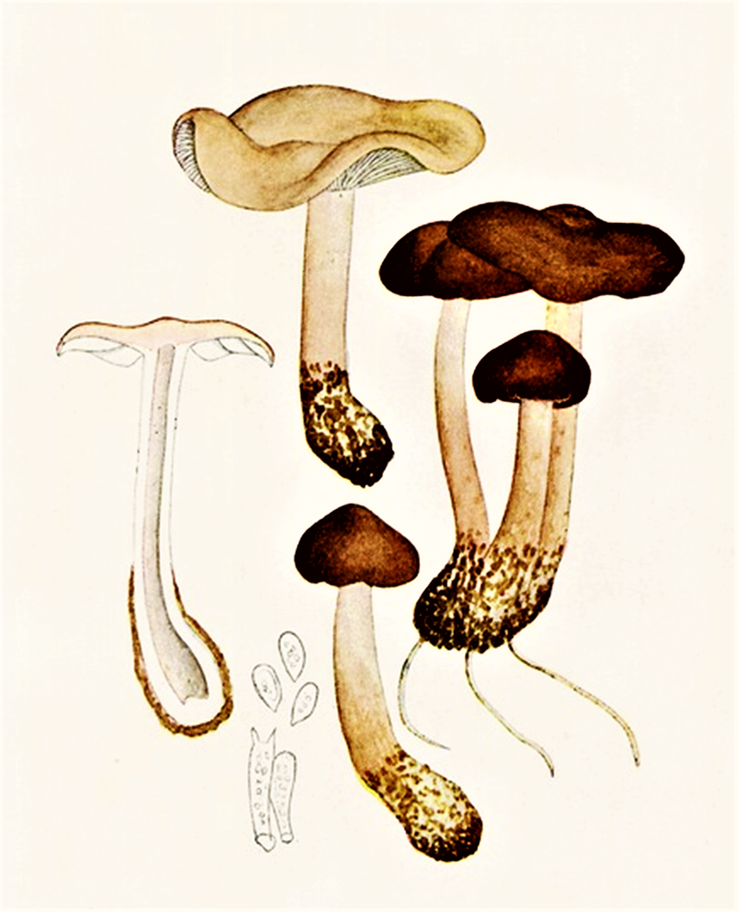 Giacomo Bresadola: Collybia dryophila (Bull., 1790) P.Kumm. (1871), heute Gymnopus dryophilus (Bull.) Murrill (1916)